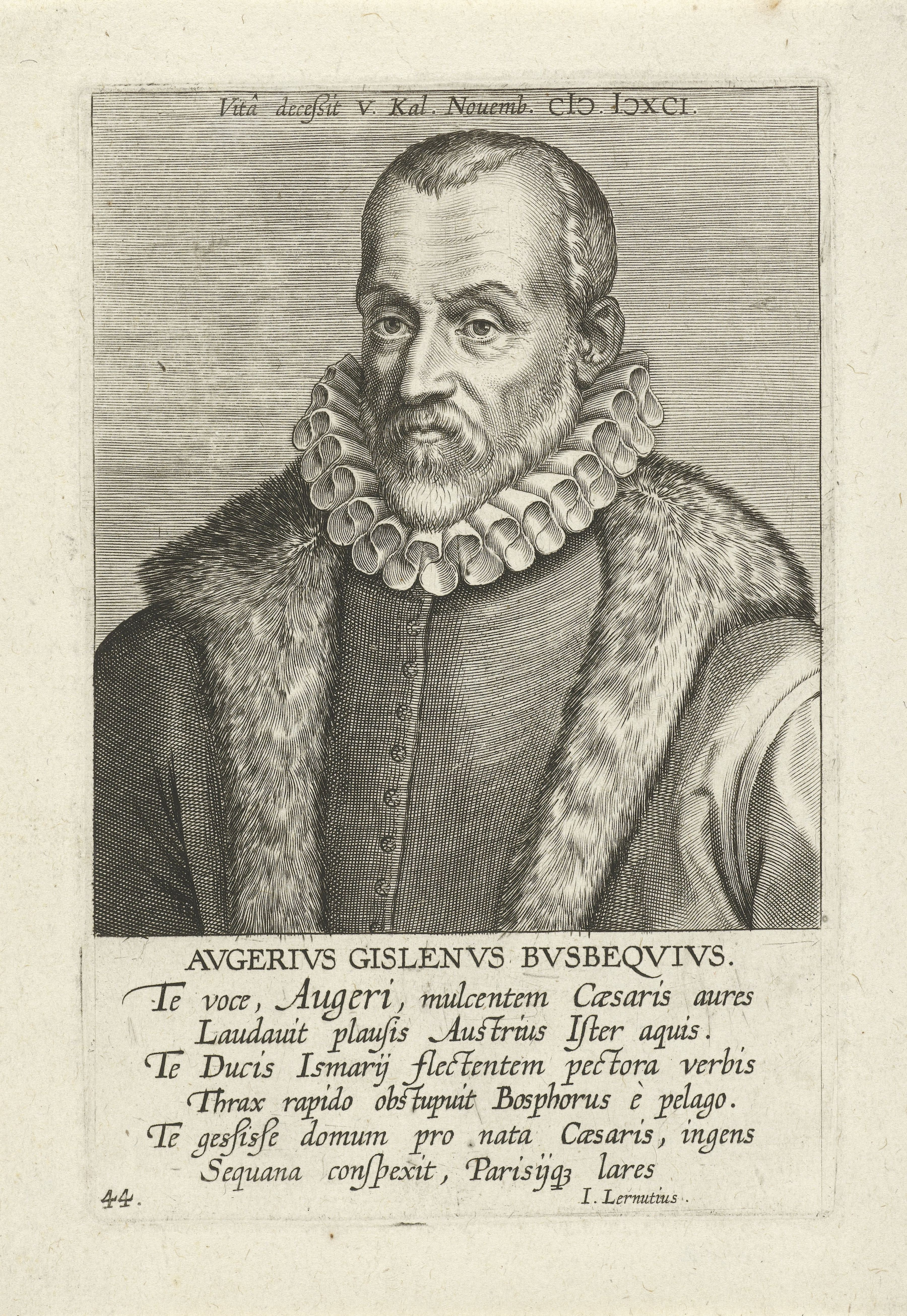 IdentificatieTitel(s): Portret van Ogier Ghislain de BusbecqAvgerivs Gislenvs Bvsbeqvivs (titel op object)Portretten van beroemde Nederlandse en Vlaamse geleerden (serietitel)Illustrium Galliae Belgicae scriptorum icones et elogi (serietitel)Objecttype: prent Serienummer: 44/51Objectnummer: RP-P-1910-4310Catalogusreferentie: New Hollstein Dutch fig. 15-1(2)Opschriften / Merken: verzamelaarsmerk, verso midden, gestempeld: Lugt 2228Omschrijving: Portret van Ogier Ghislain de Busbecq, diplomaat en geleerde. Buste naar links. De prent heeft een Latijns boven- en onderschrift en maakt deel uit van een serie van beroemde Nederlandse en Vlaamse geleerden.VervaardigingVervaardiger: prentmaker: Philips Galle (toegeschreven aan atelier van)schrijver: Janus Lernutius (vermeld op object)uitgever: Philips Galle (mogelijk)uitgever: Theodoor Galle (mogelijk)Plaats vervaardiging: AntwerpenDatering: 1604Fysieke kenmerken: gravureMateriaal: papier Techniek: graveren (drukprocedé)Afmetingen: plaatrand: h 162 mm × b 108 mmOnderwerpWie: Ogier Ghislain de BusbecqVerwerving en rechtenVerwerving: aankoop 1905Copyright: Publiek domein